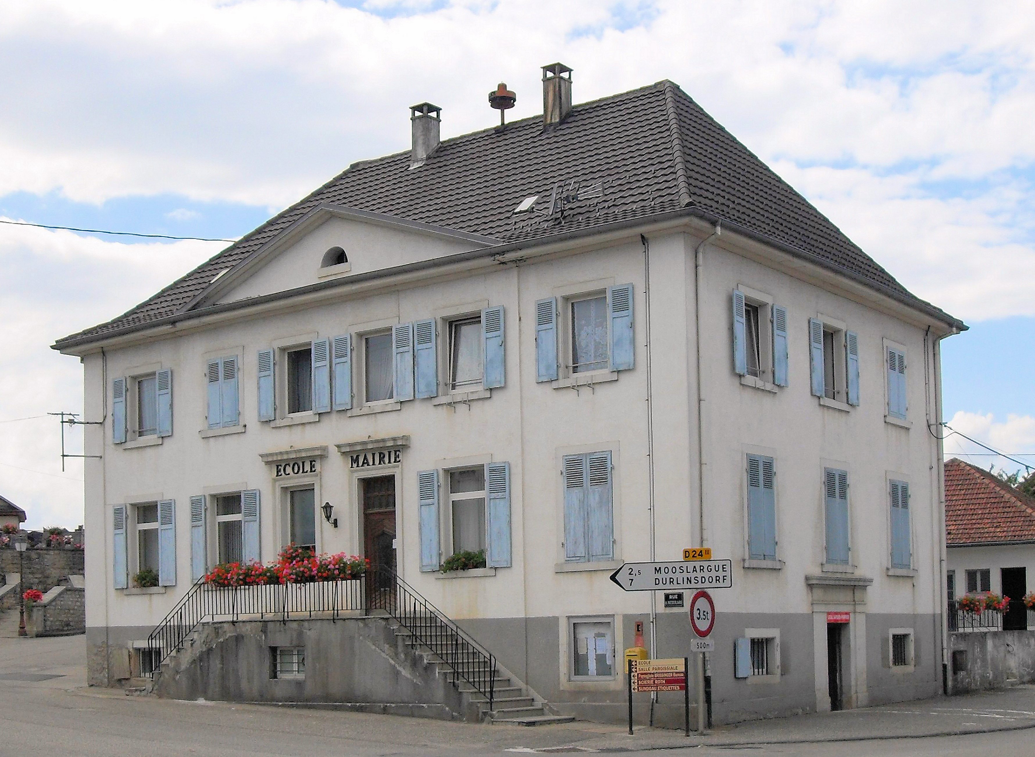 La mairie-école de Bisel